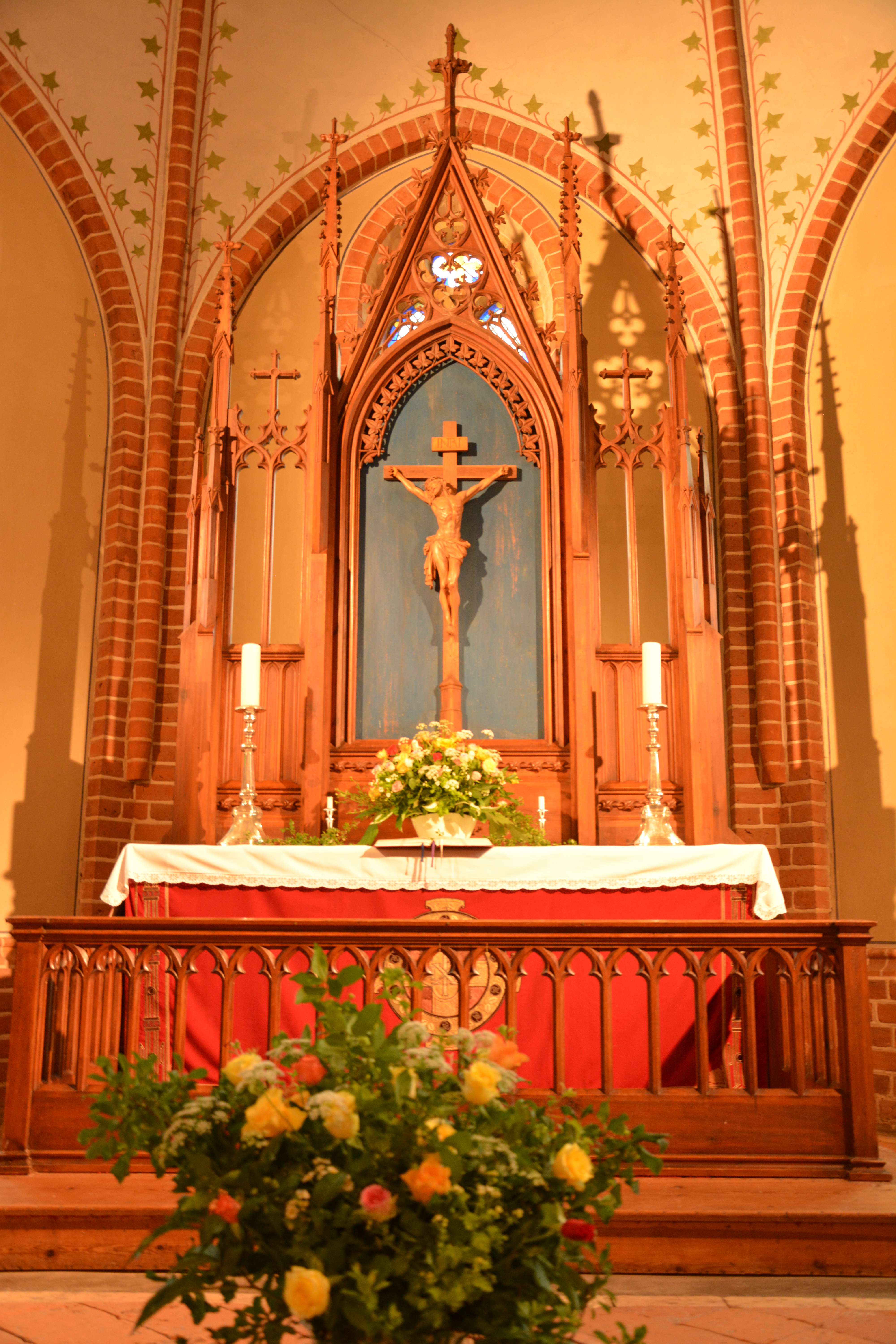 Dorfkirche Lüssow Landkreis Rostock neugotischer Altar